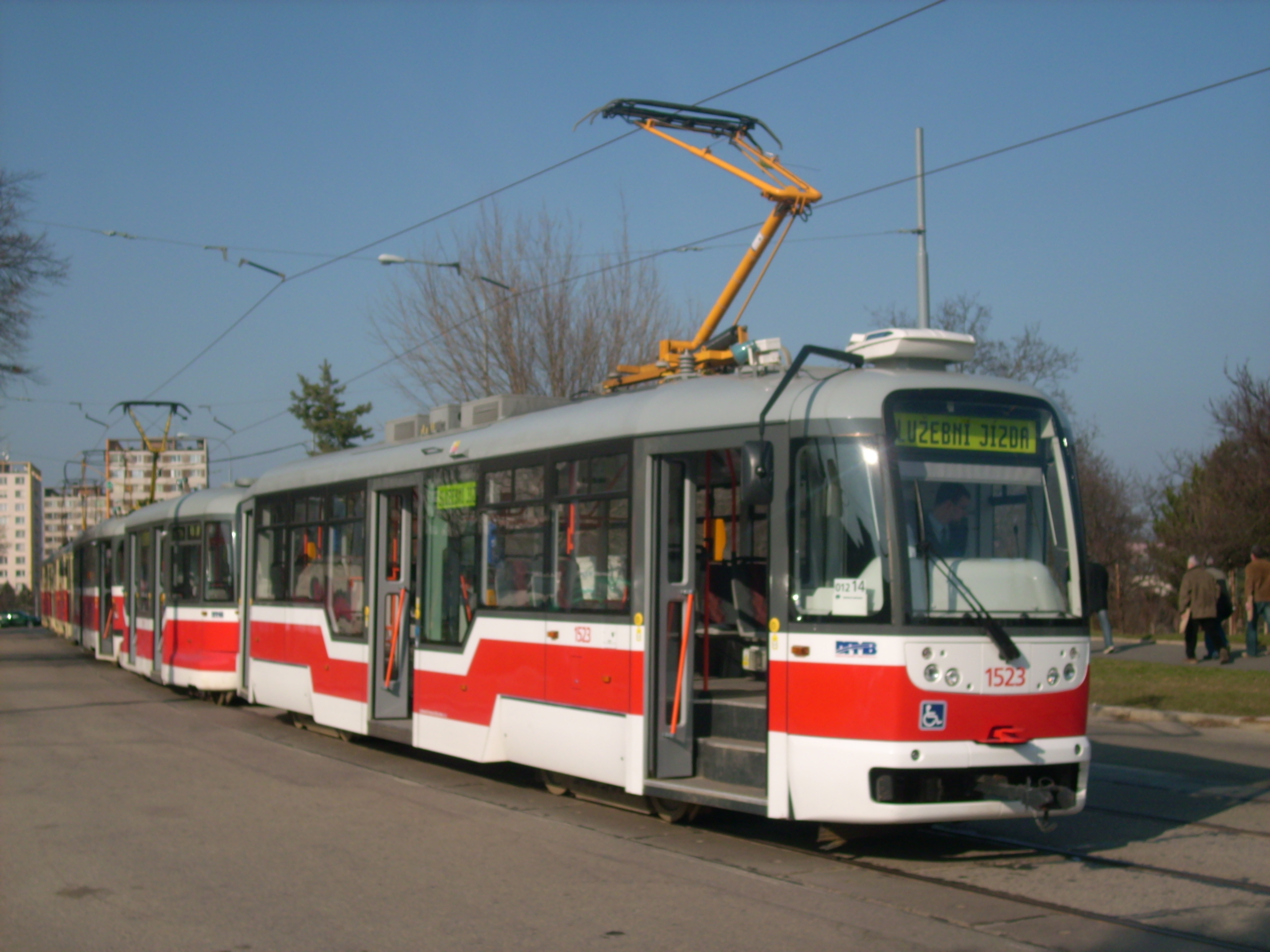 Trojče Vario LF+VV60LF+Tatra T3R.EV v Brně